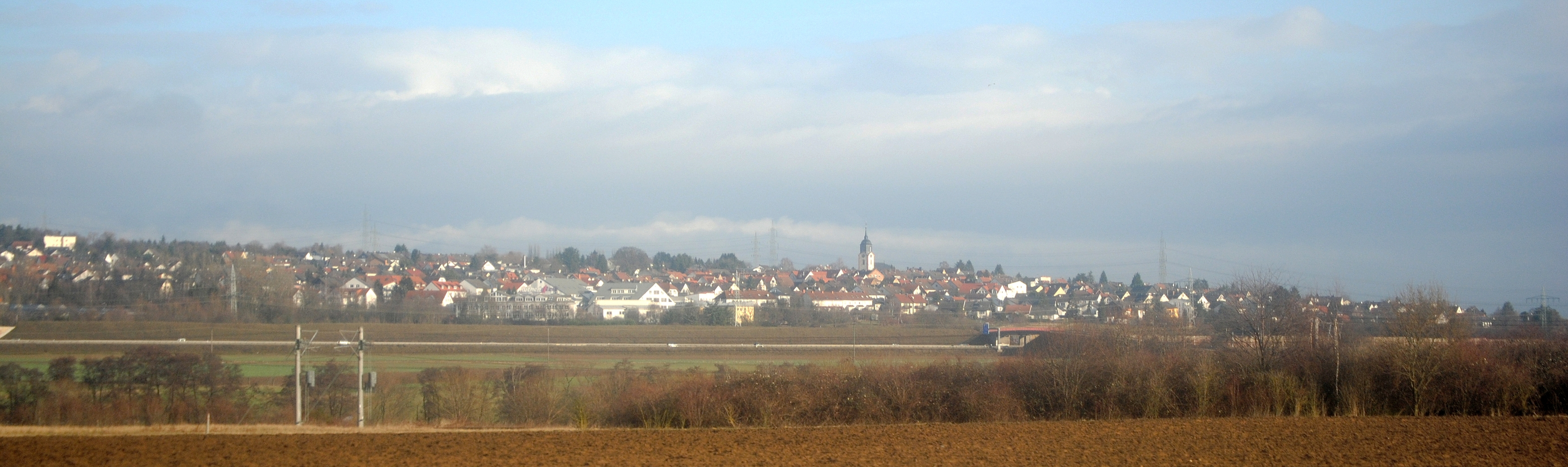 Blick von der Autobahn A3 von Südwesten aus auf den Ortsbezirk Diedenbergen, Hofheim am Taunus (Main-Taunus-Kreis, Hessen)